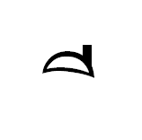 сара и